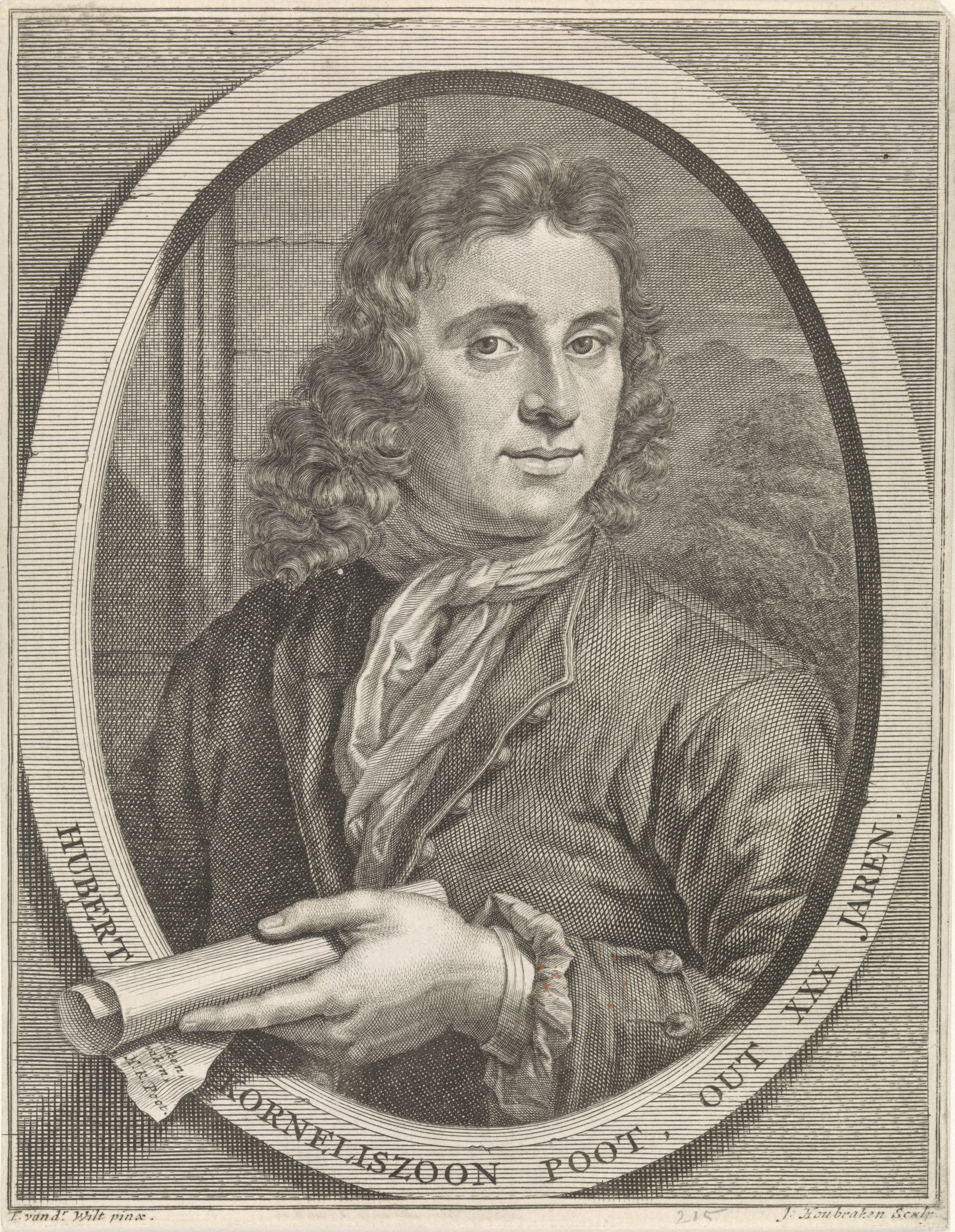 IdentificatieTitel(s): Portret van Hubert Korneliszoon PootObjecttype: prent Objectnummer: RP-P-OB-48.433Catalogusreferentie: Ver Huell 337FMP 4268-bOpschriften / Merken: verzamelaarsmerk, verso linksonder, gestempeld: Lugt 240Omschrijving: Portret van dichter Hubert Korneliszoon Poot op dertigjarige leeftijd in een ovaal, met randschrift in het Nederlands.VervaardigingVervaardiger: prentmaker: Jacob Houbraken (vermeld op object)naar schilderij van: Thomas van der Wilt (vermeld op object)uitgever: Reinier Boitet (mogelijk)Plaats vervaardiging: prentmaker: Amsterdamuitgever: DelftDatering: 1722 - 1726Materiaal: papier Techniek: graveren (drukprocedé)Afmetingen: blad: h 187 mm × b 145 mmToelichtingPrent ook gebruikt in: Poot, Hubert Kornelisz. Gedichten van Hubert Korneliszoon Poot, met kunstige printen versiert [eerste deel] / H.K. Poots gedichten [eerste deel]. 1e druk. Delft: Reinier Boitet, 1722. En in: Poot, Hubert Kornelisz. Gedichten van Hubert Korneliszoon Poot, met kunstige printen versiert [eerste deel] / H.K. Poots gedichten [eerste deel]. 2e druk. Delft: Reinier Boitet, 1726.OnderwerpWat: historical personsWie: Hubert Kornelisz. PootVerwerving en rechtenVerwerving: overdracht van beheer 1816Copyright: Publiek domein